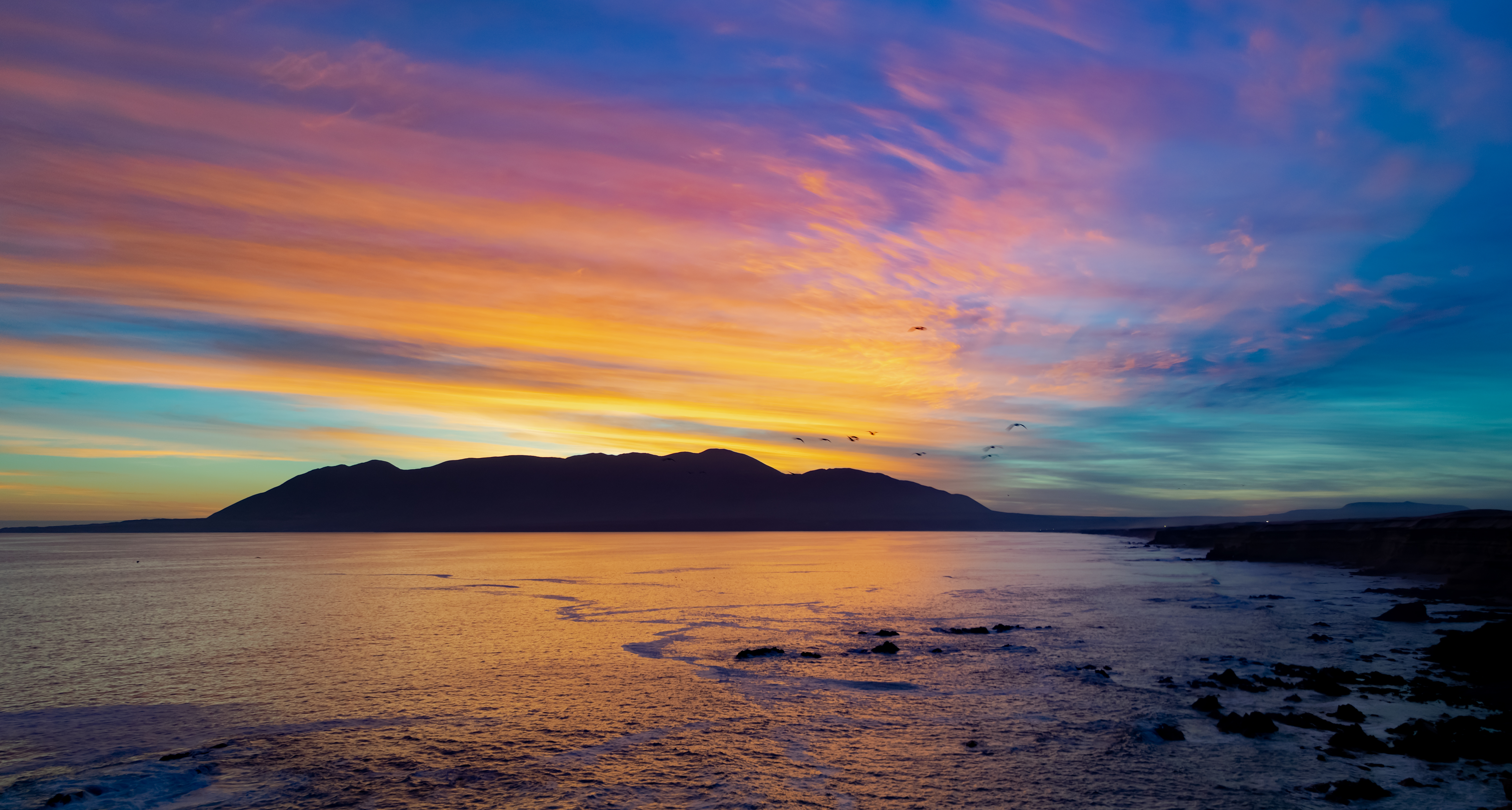 Vista al norte del Monumento Natural La Portada, apuntando al Balneario Juan López. Esta fotografía fue tomada el 01/07/2018 a las 19:20 aproximadamente, cuando el atardecer produce estos bellos colores, contrastados con el inmenso Morro Moreno